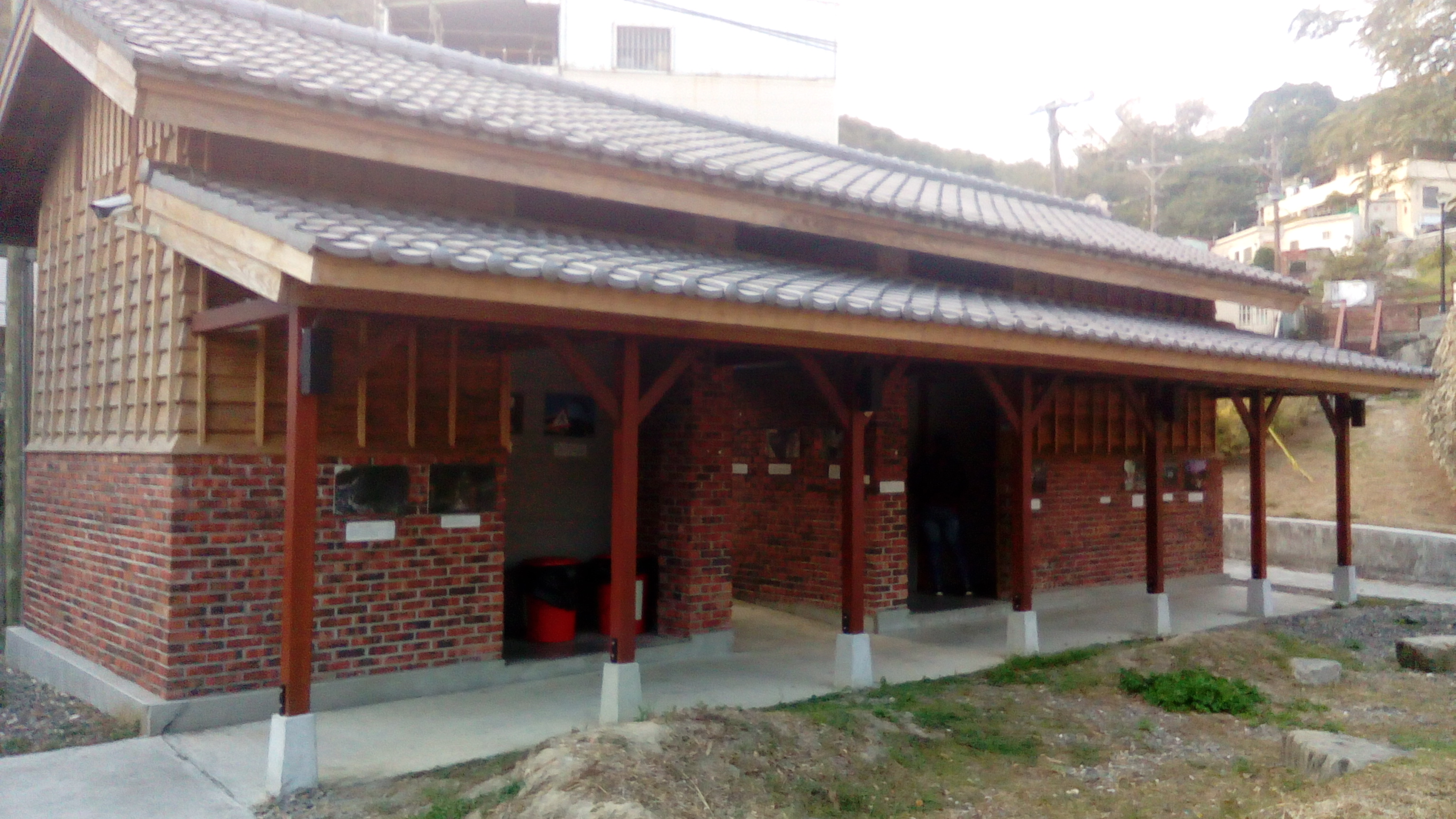 同上